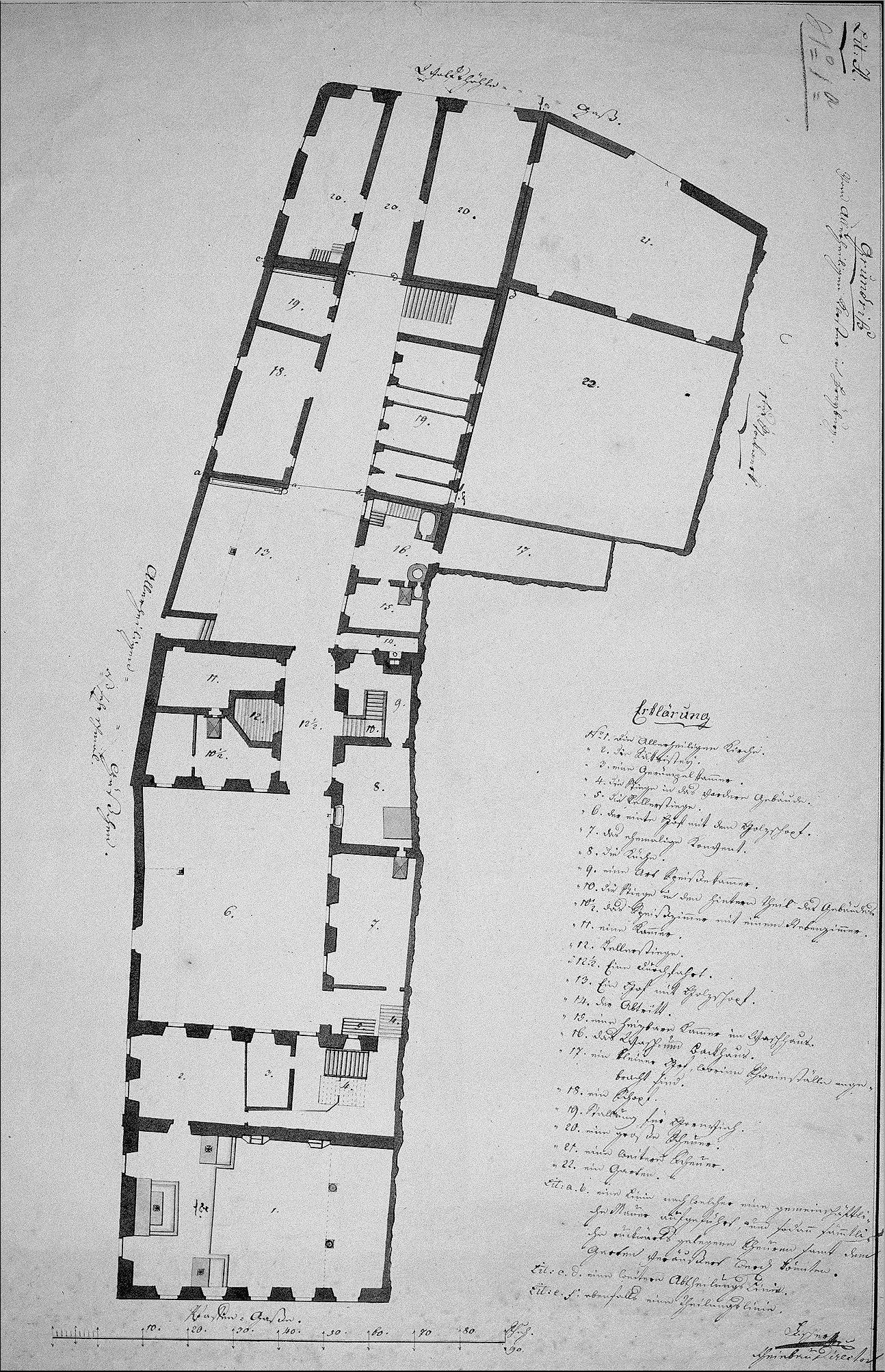 Lageplan des Augustiner Chorrherrenstifts im 18. Jahrhundert